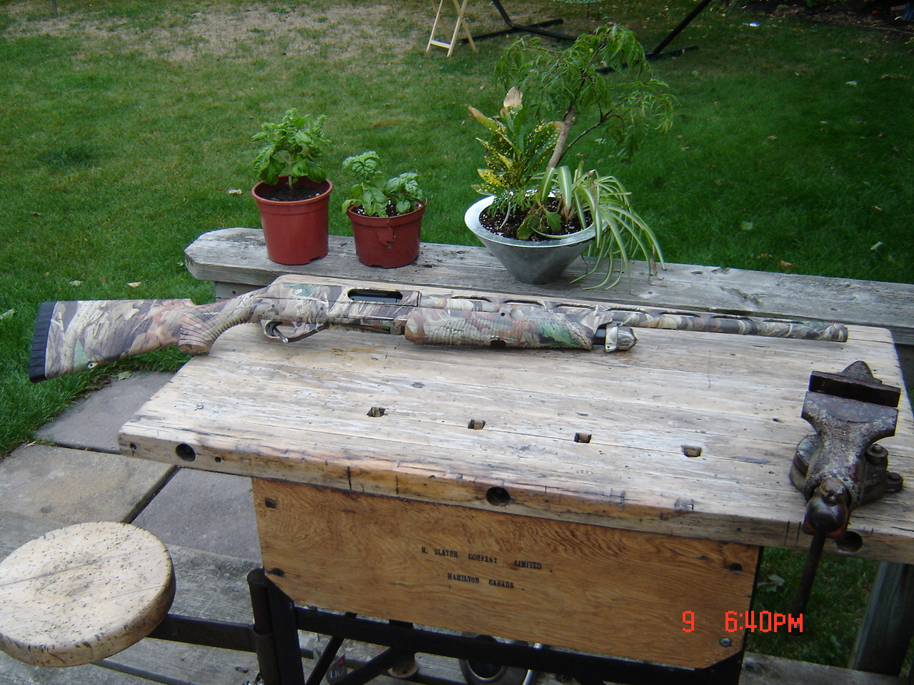 Benelli Nova in Advantage camo 12 gauge shotgun